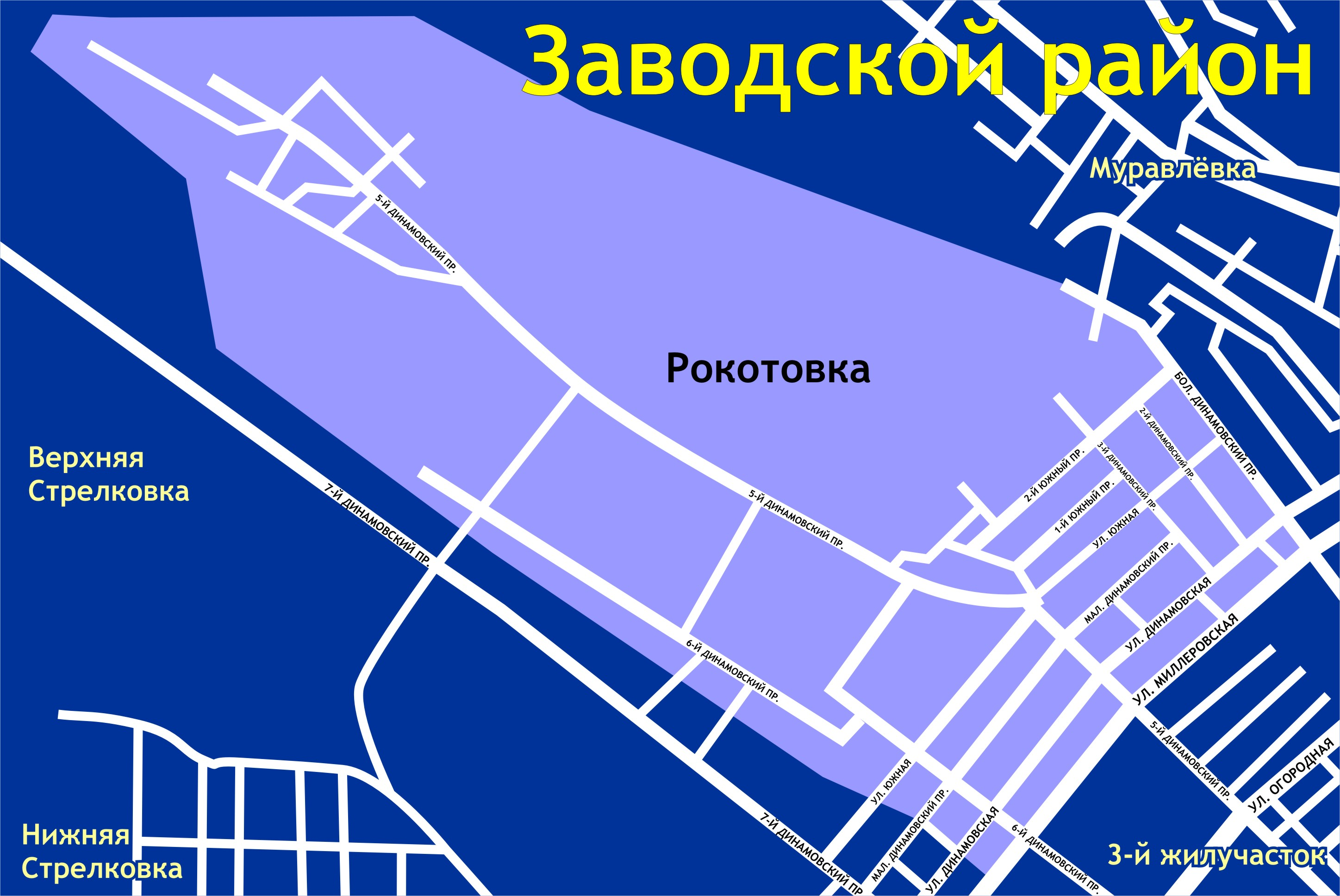 Географическое положение Рокотовки (Саратов)